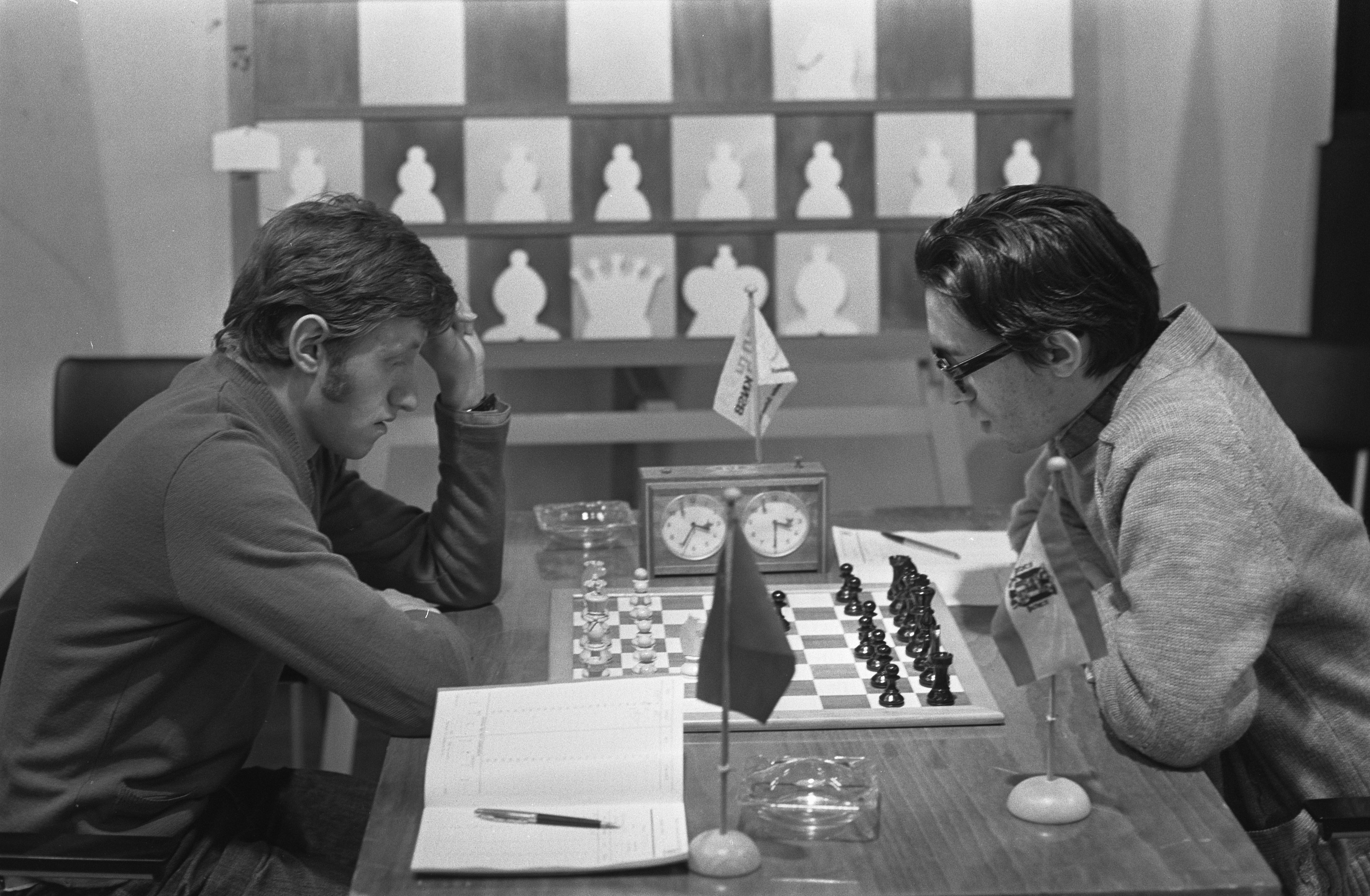 Collectie / Archief : Fotocollectie Anefo Reportage / Serie : [ onbekend ] Beschrijving : Europees Jeugdkampioenschap Schaken (elfde Niemeyer schaaktoernooi) te Groningen, nummer 14, 15 en 16 Romanishin (links) en Angel Martin Gonzalez Datum : 20 december 1972 Locatie : Groningen Trefwoorden : schaken, toernooien Persoonsnaam : Martin Fotograaf : Croes, Rob C. / Anefo Auteursrechthebbende : Nationaal Archief Materiaalsoort : Negatief (zwart/wit) Nummer archiefinventaris : bekijk toegang 2.24.01.05 Bestanddeelnummer : 926-1167